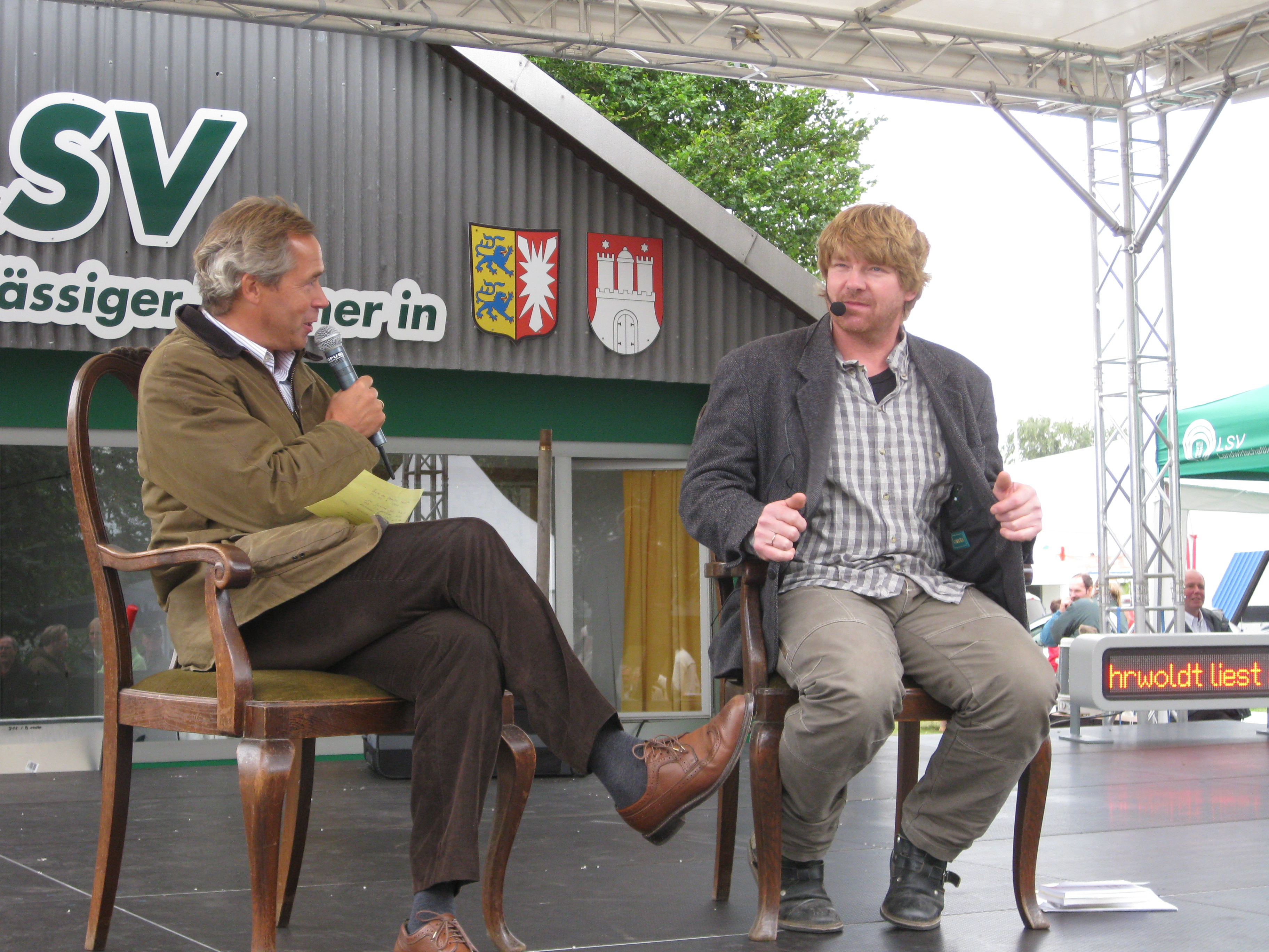 Matthias Stührwoldt bei einer Lesung zusammen mit Christian Pipke anläßlich der NORLA 2009